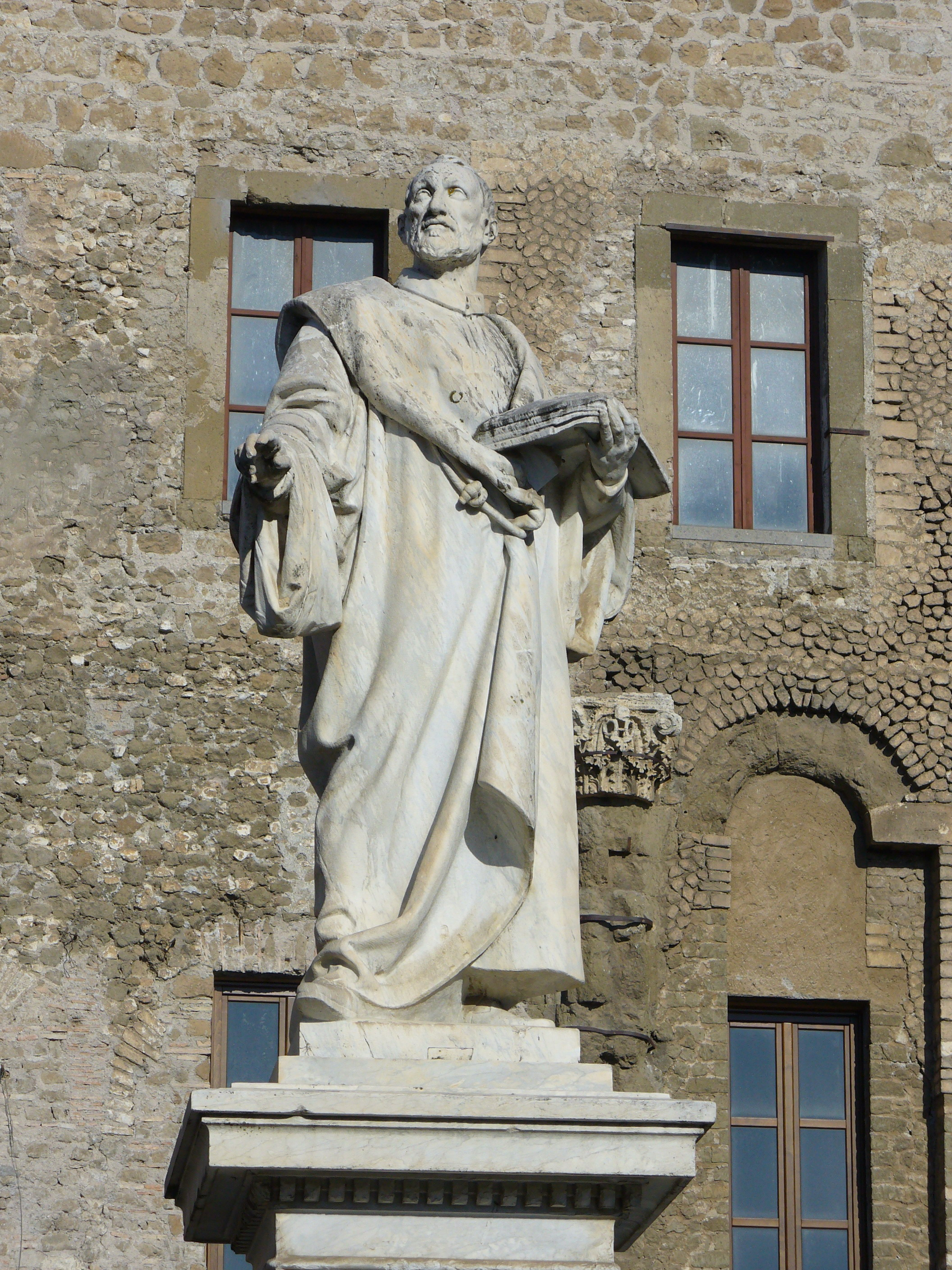 Palestrina (Italy) - Statua di Pierluigi da Palestrina